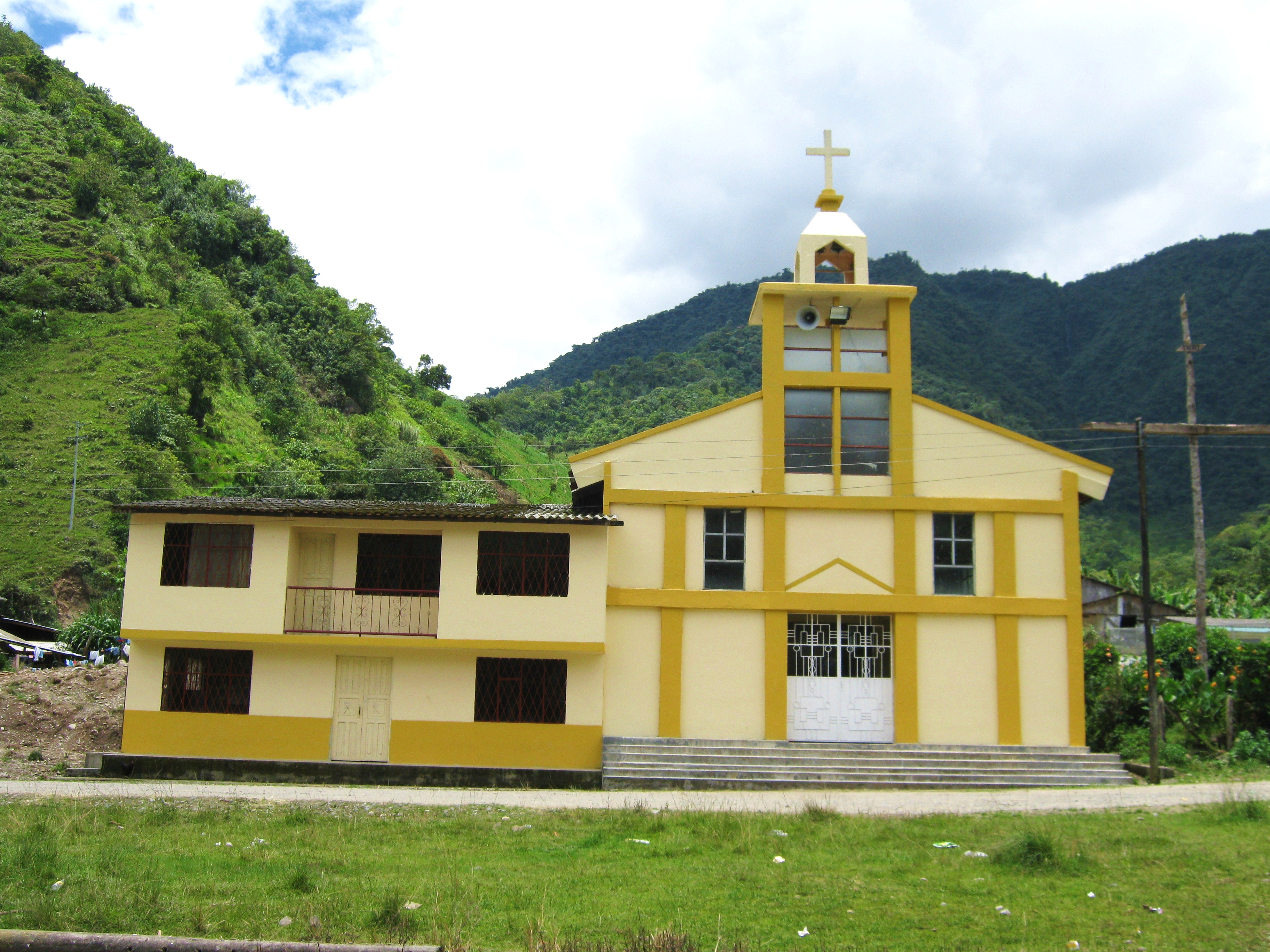 Capilla de Monopamba en 2010